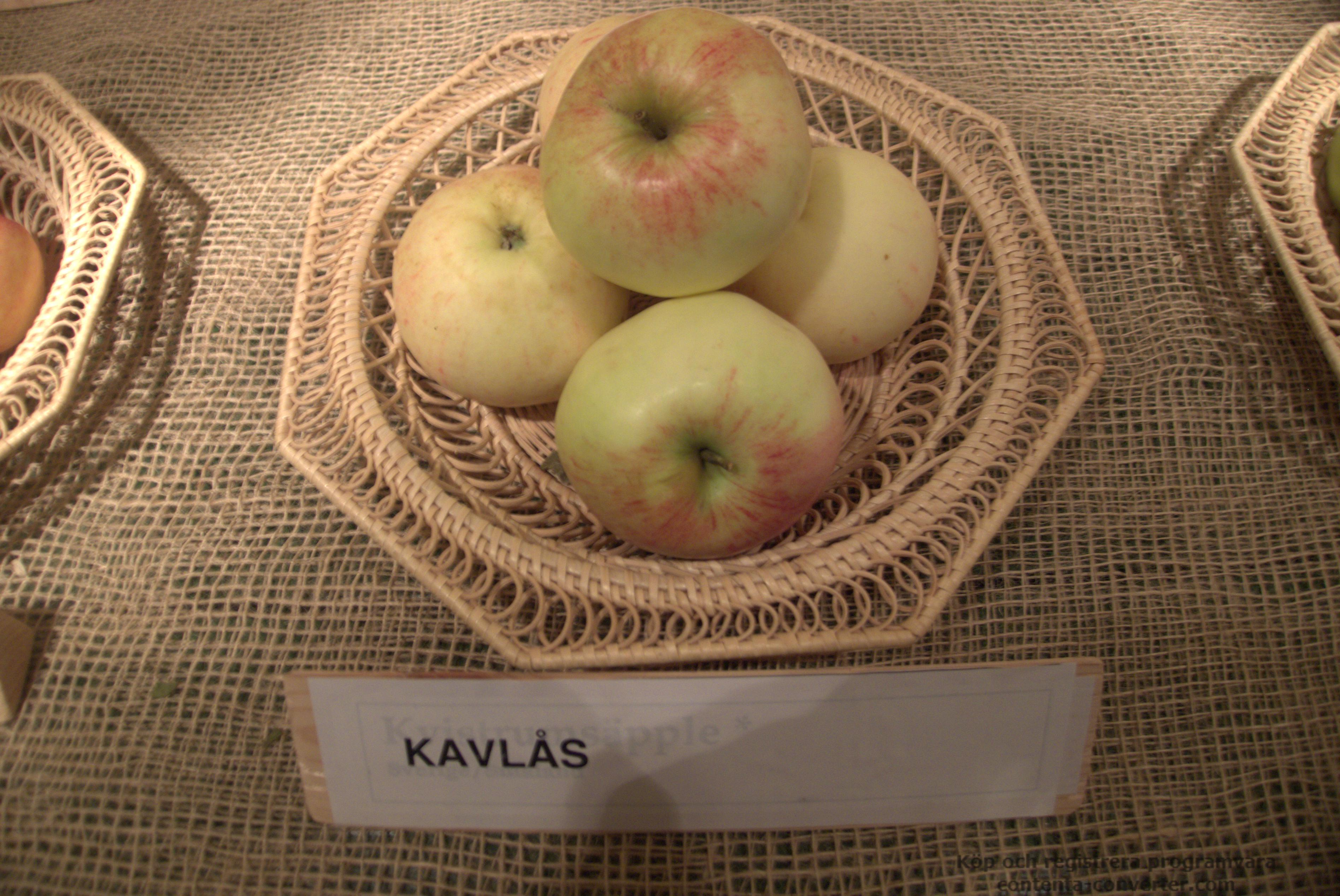 Äpplen av sorten Kavlås